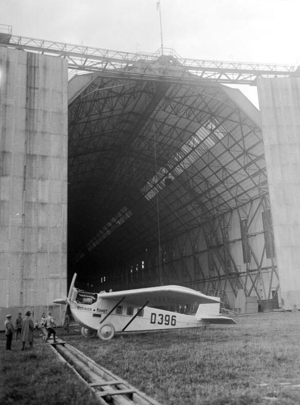 Friedrichshafen! Eine Zeppelin-Luftschiffhalle als Unterkunfsraum für Flugzeuge Die Zeppelinhalle bei Friedrichshafen am Bodensee, die seinerzeit das Luftschiff "Bodensee" beherbergte, braucht nicht abgerissen werden und dient dem internationalen Verkehr zur Unterbringung von Flugzeugen usw.